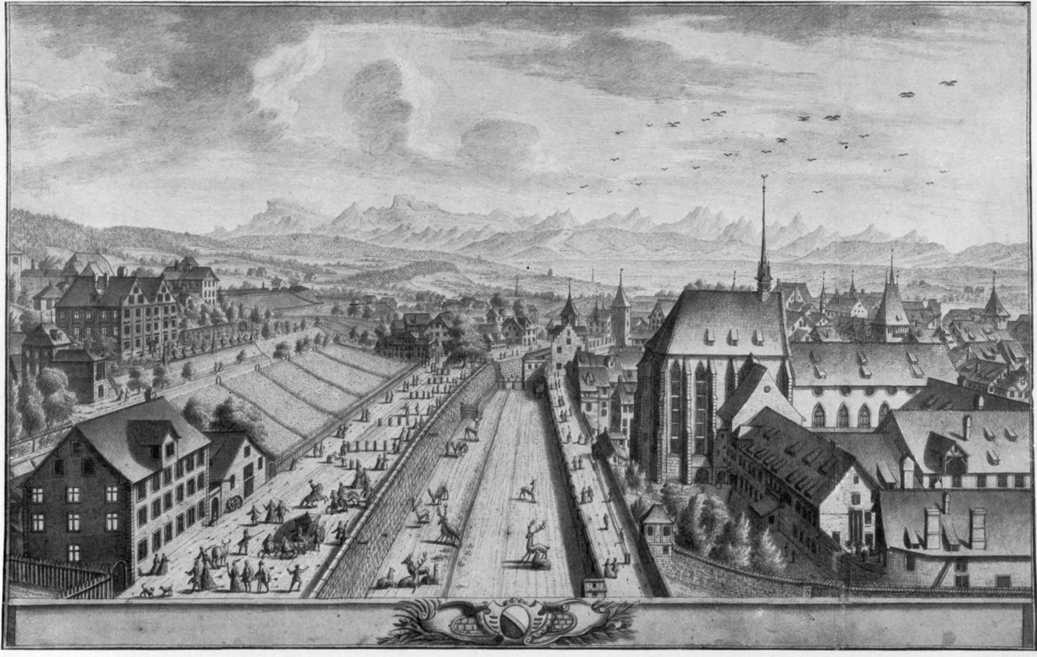 Der Hirschen- und der Seilergraben in Zürich um 1750. Rechts das ehemalige Predigerkloster. Im Hintergrund das Kronentor und der Wolfsturm der zweiten Stadtbefestigung. Tuschzeichnung.